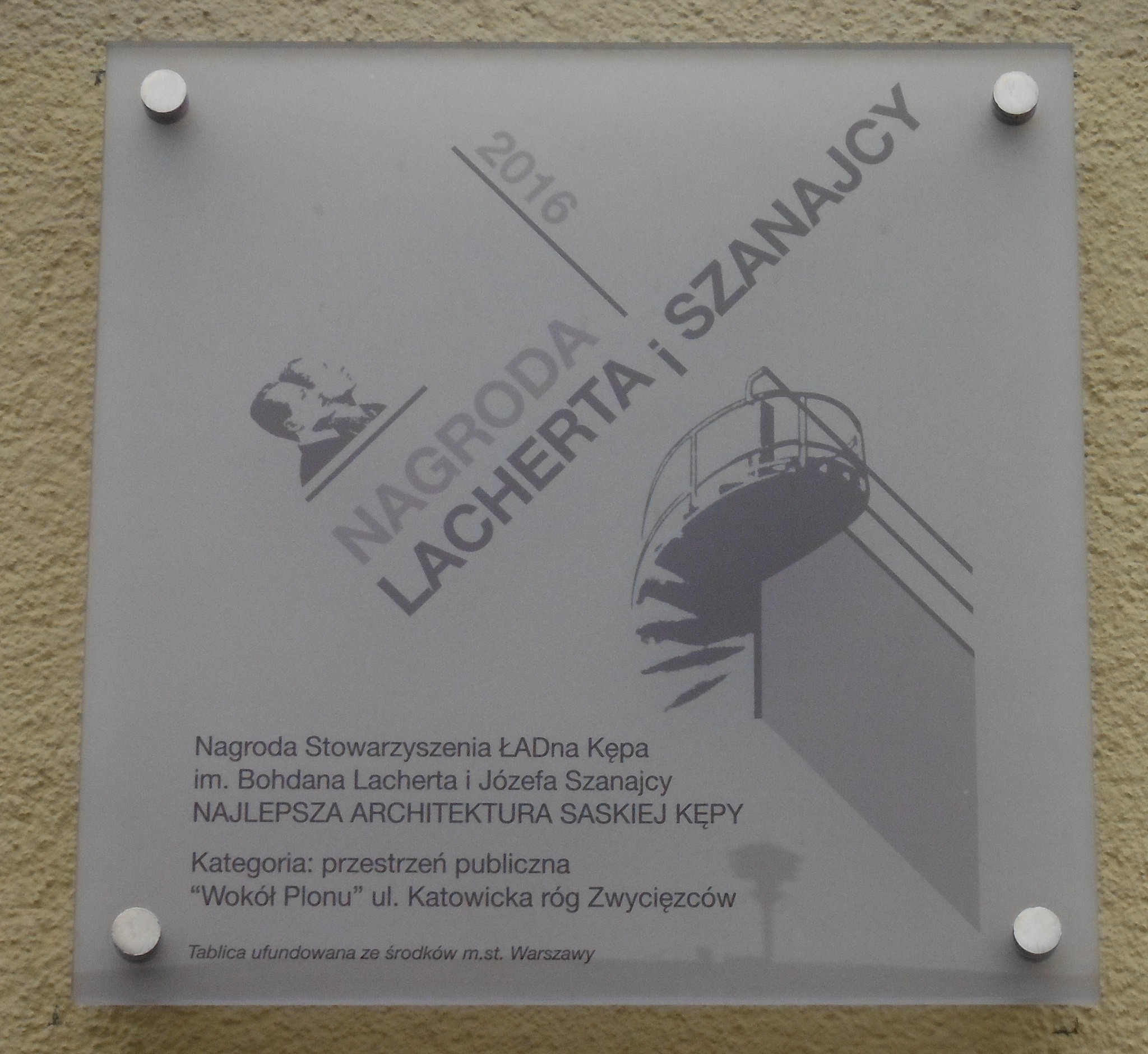 Tablica przy płaskorzeźbie "Plon" w Warszawie potwierdzająca przyznanie nagrody im. Bohdana Lacherta i Józefa Szanajcy.